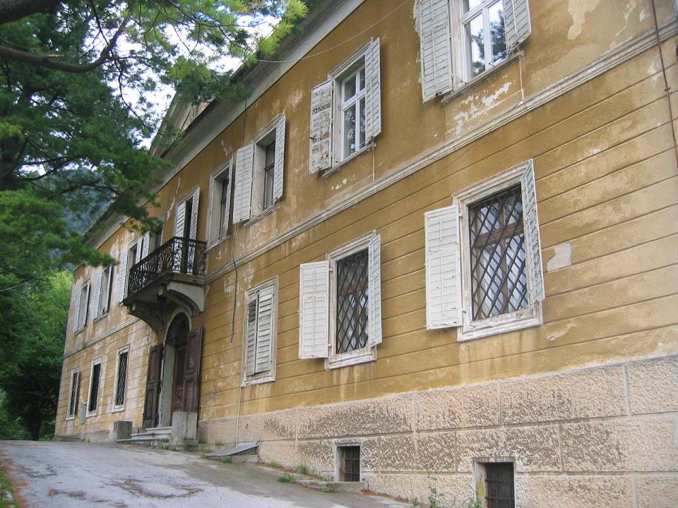 Tržič, Slovenia (Radetzky's Neuhaus Castle) photo:Ziga 12:07, 21 October 2006 (UTC)